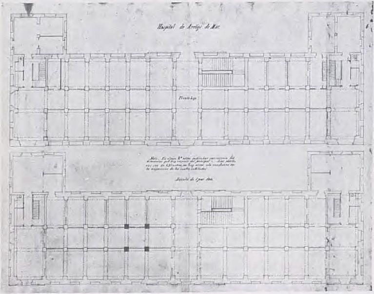 Plànols de planta de l'Hospital Xifré aixecats per Elies Rogent el 1873